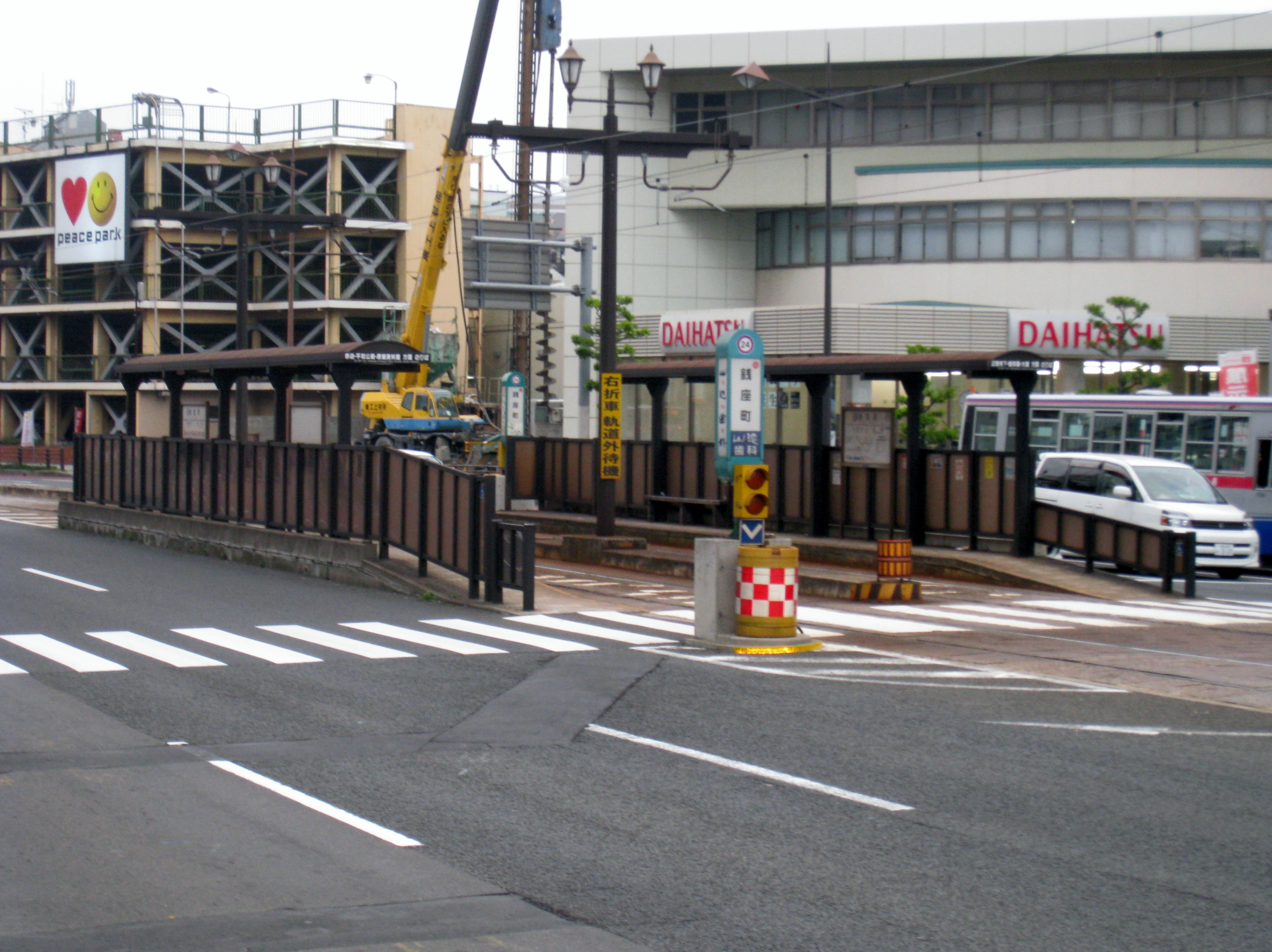 長崎市銭座町電停